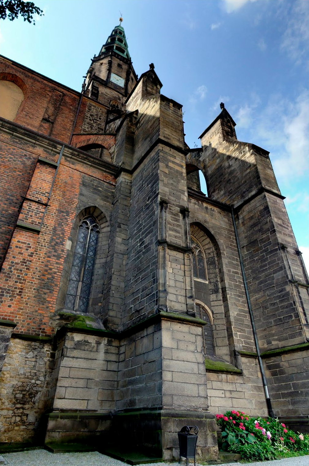 Świdnica, kościół par. p.w. śś. Stanisława i Wacława, 1330-1390, XVI, 1893-1895